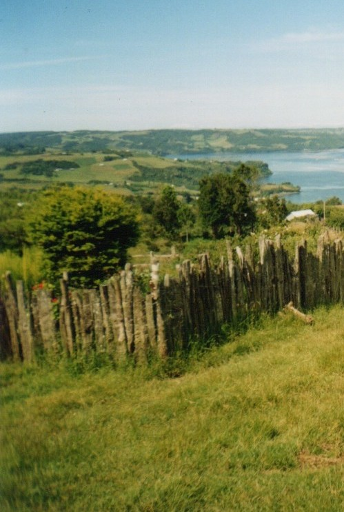 Fotografía tomada en Quiquel Alto